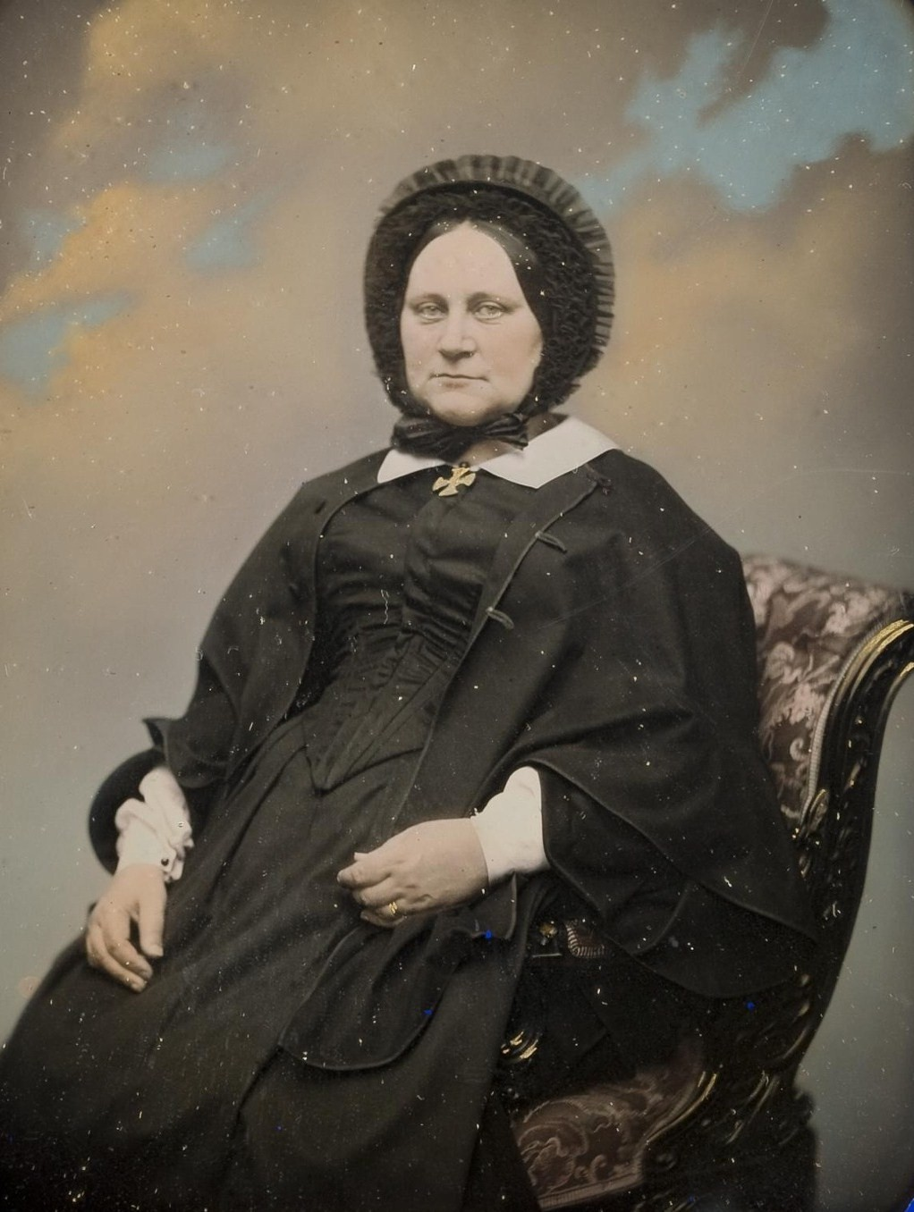 Мария Трофимовна Пашкова, ур. Баранова (1803/1807-1887), выпускница Смольного ин-та, фрейлина, дочь Т.О.Баранова (1779-1828) и Ю.Ф.Адлерберг (1789-1864), с 1829 года жена Михаила Васильевича Пашкова (1802-1863).